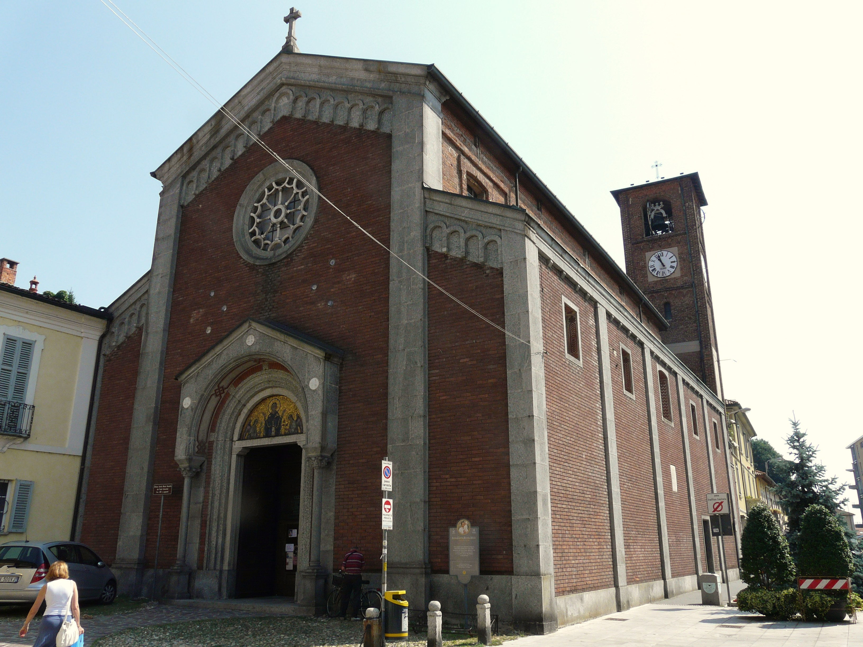 Chiesa di Santa Maria Assunta dei Padri Celestini, Magenta, Lombardia, Italia